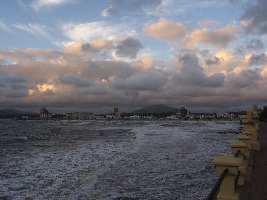 Rambla de Piriápolis, en el departamento de Maldonado, Uruguay.